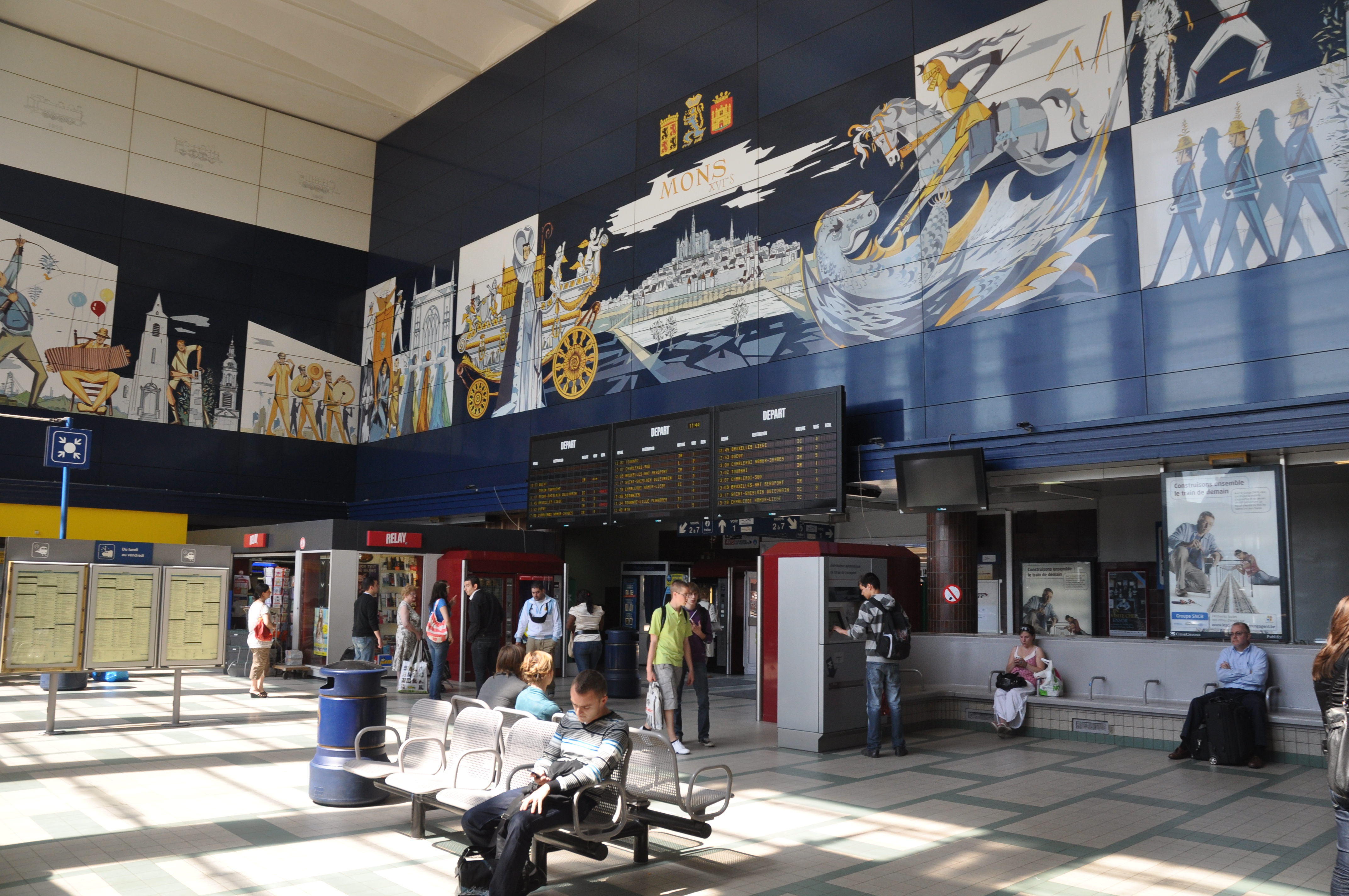 Fresque de Jacques D'Hondt présentant la ville de Mons et son folklore voué à disparaitre